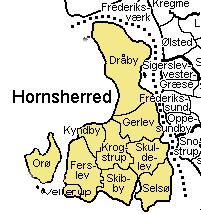 Hornsherred Frederiksborg Amt , Denmark. Map by Svend-Erik Christiansen, edited by user:Nico-dk .